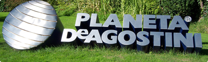 Conocenos PASA